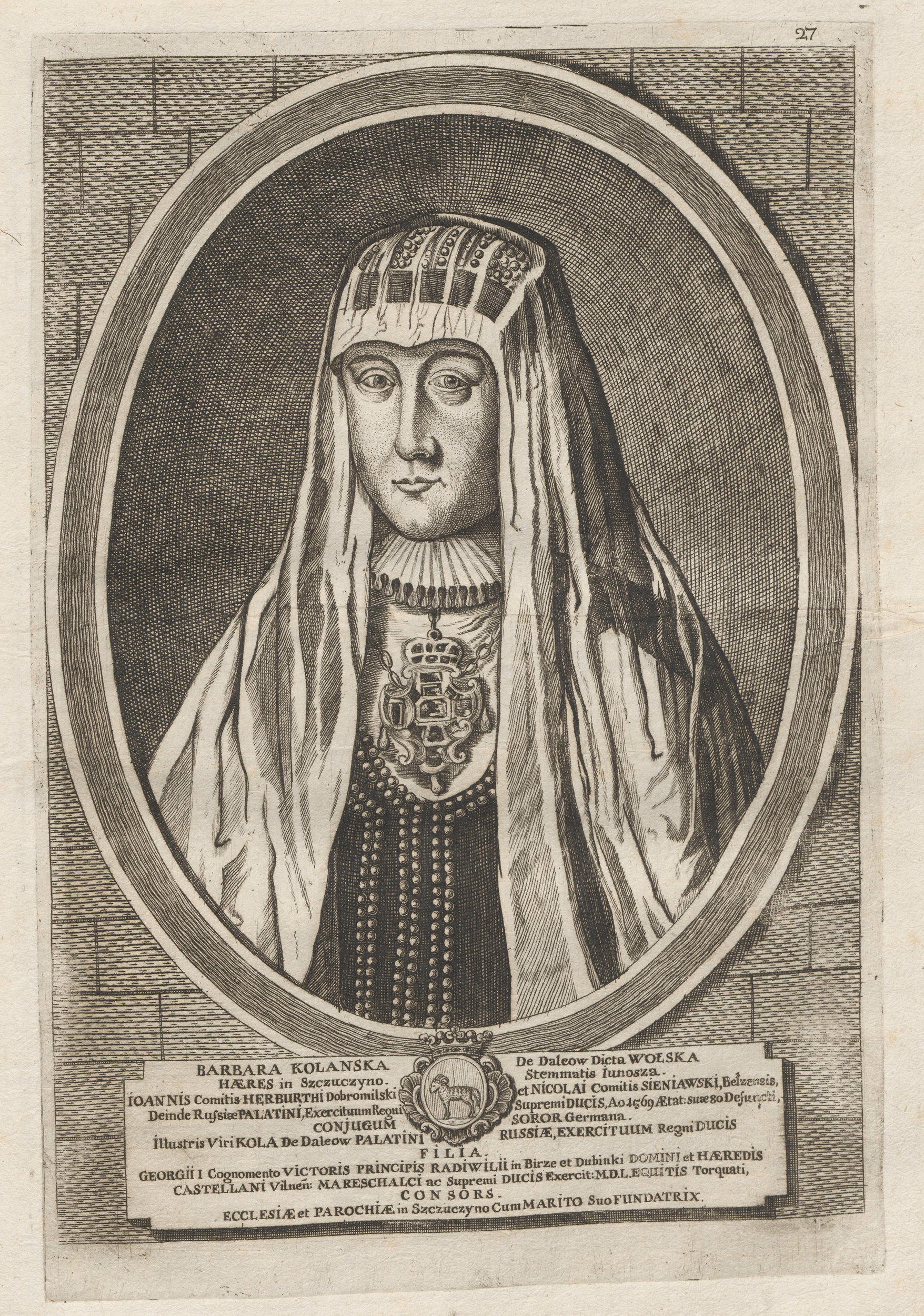 Беларуская (тарашкевіца): Партрэт Барбары Радзівіл (Barbara Radzivił) з Колаў (Koła)